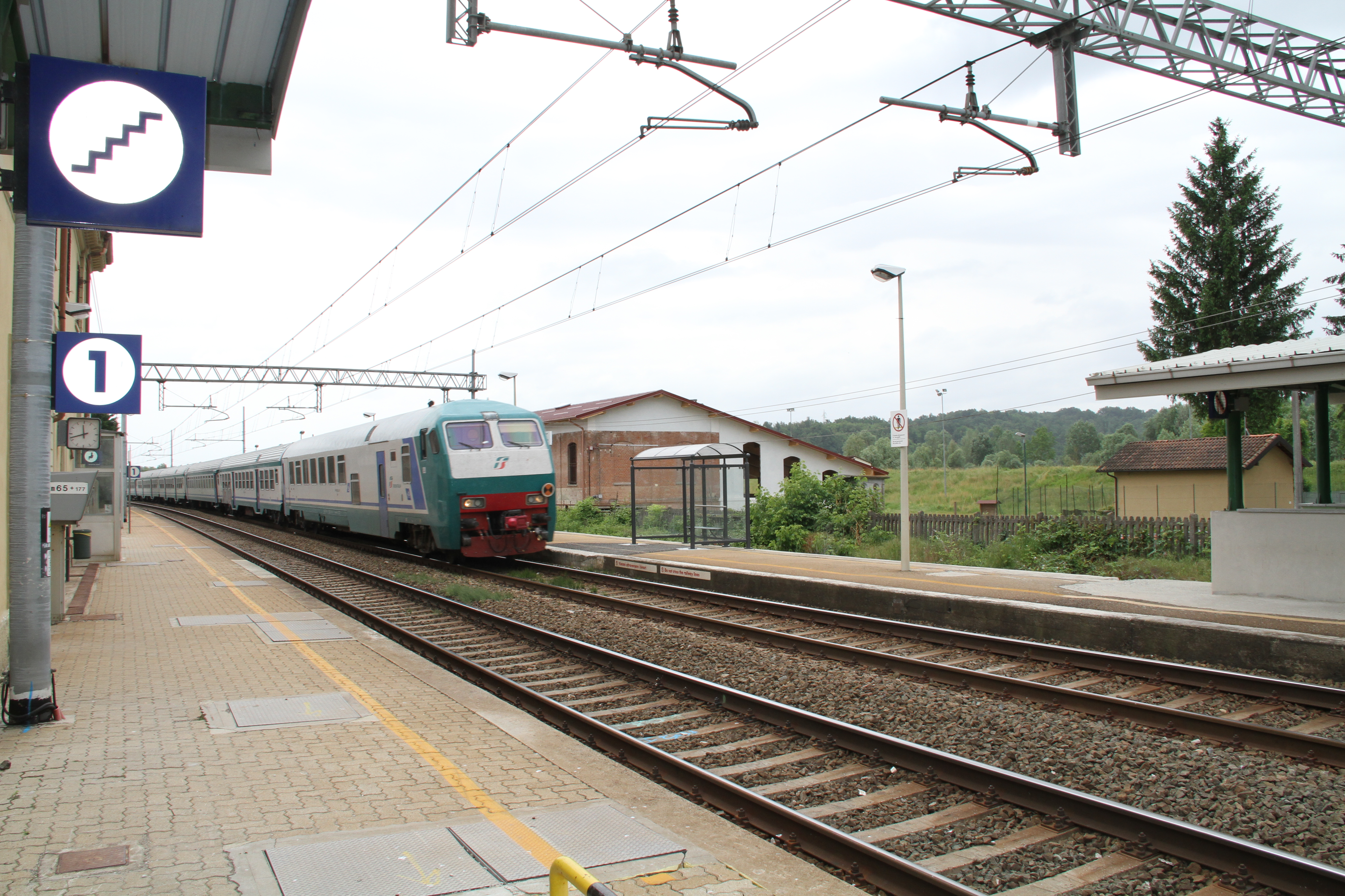 Treno in transito nella stazione di Castello d’Annone (AT), Italia.